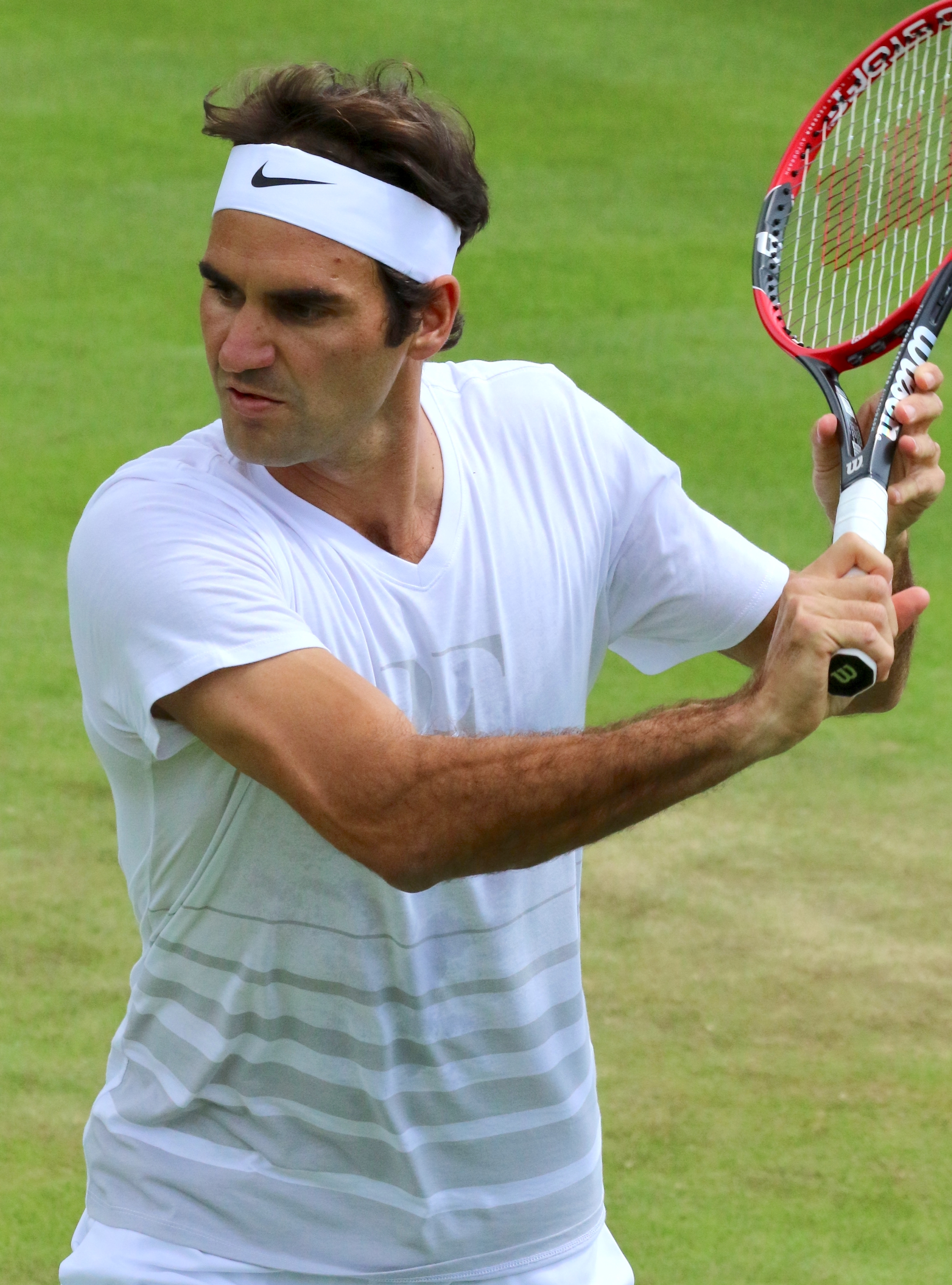 Federer WM16 (37)